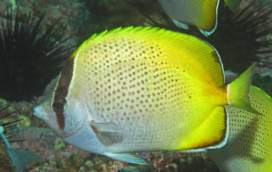 Chaetodon guentheri en islas Solitarias, Australia